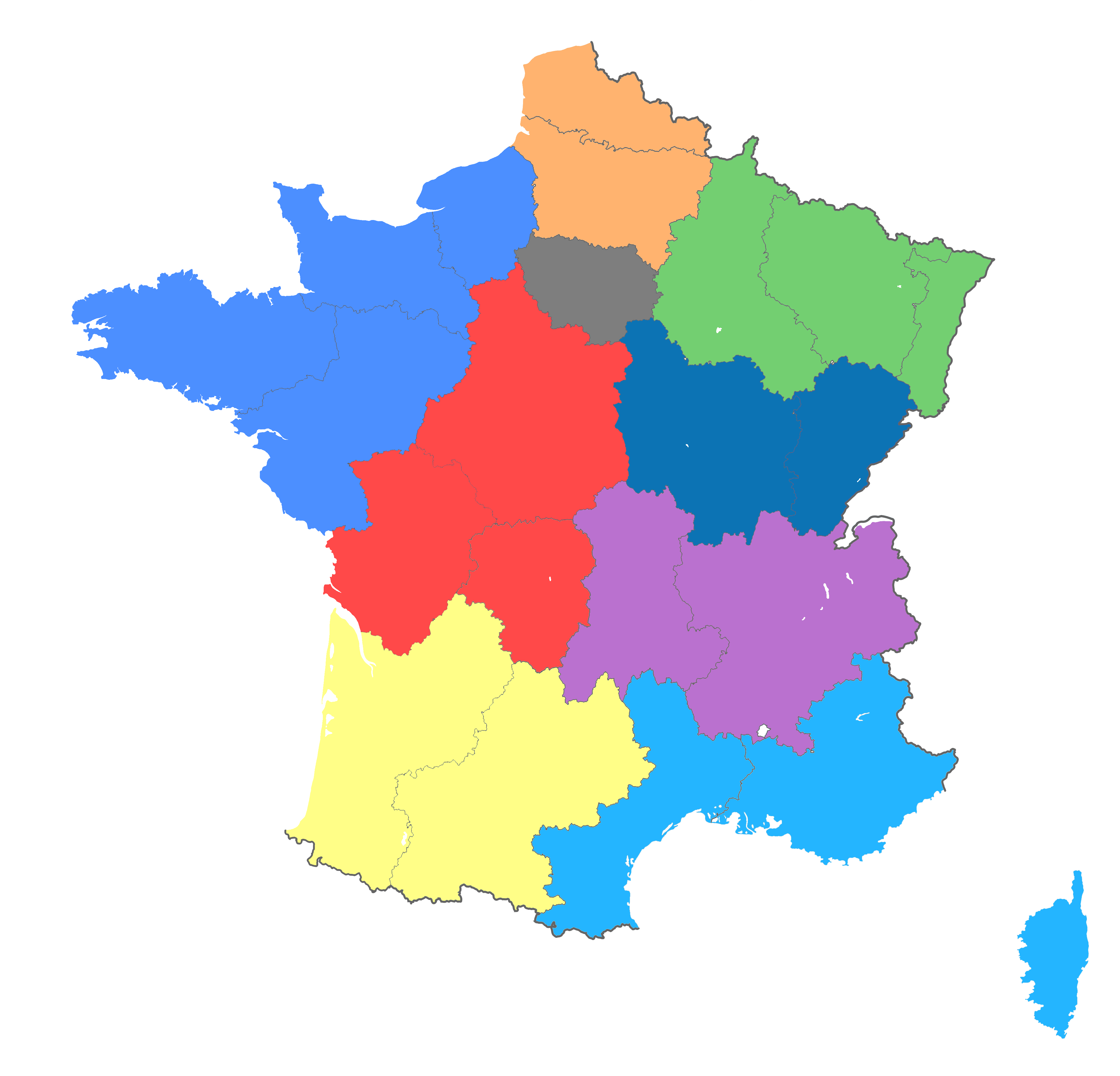 Zones de défense et de sécurité françaises en 2000. Zone de défense et de sécurité de Paris Zone de défense et de sécurité Ouest Zone de défense et de sécurité Centre-Ouest Zone de défense et de sécurité Sud-Ouest Zone de défense et de sécurité Sud Zone de défense et de sécurité Sud-Est Zone de défense et de sécurité Centre-Est Zone de défense et de sécurité Est Zone de défense et de sécurité Nord